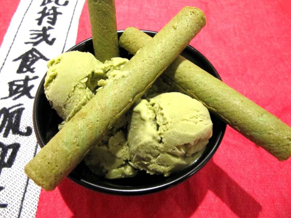 Grüntee-Eis aus Grünteepulver (Macha), dekoriert mit Waffelröllchen aus Grüntee-Teig.